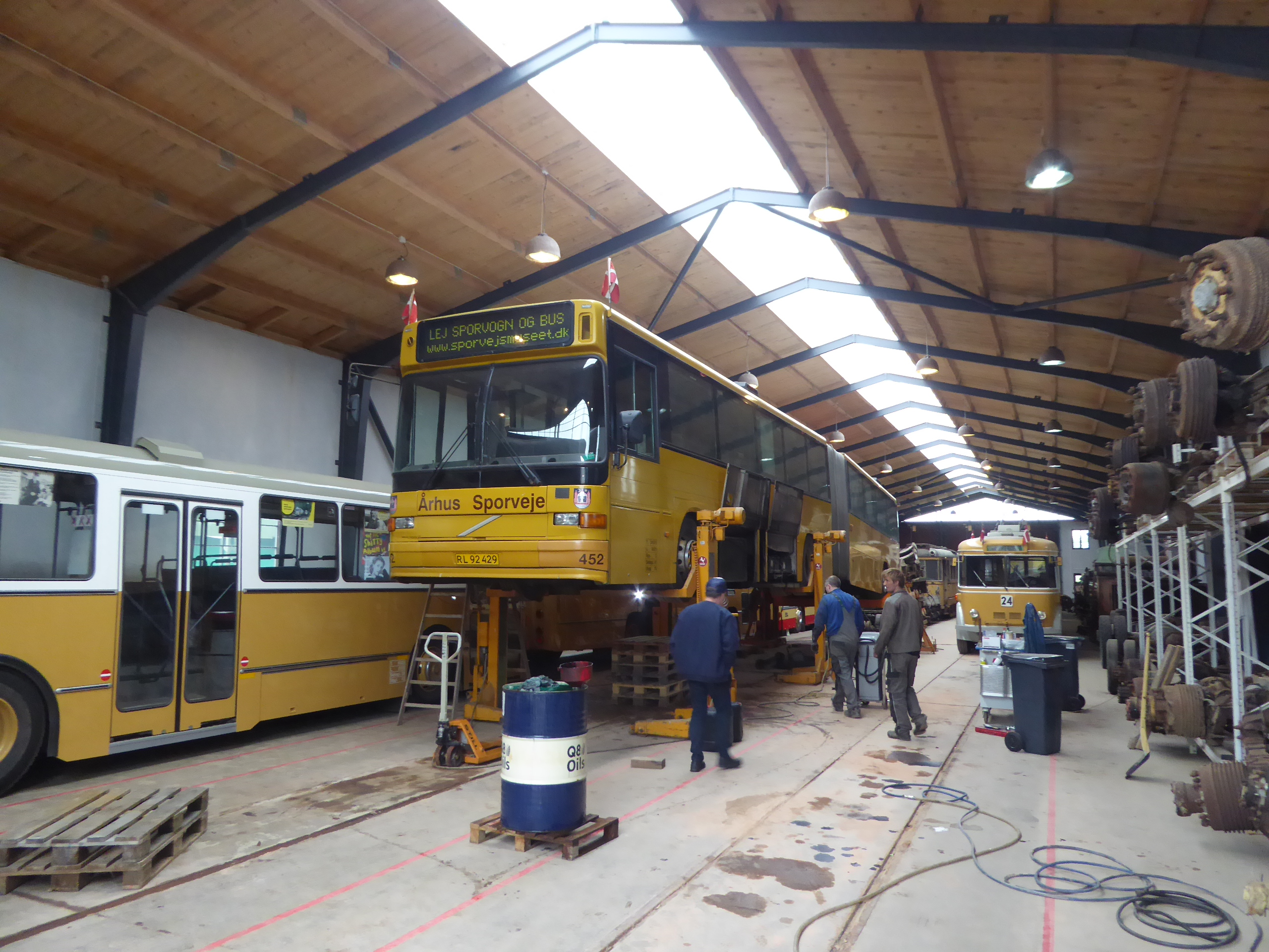 Interior of the tram and bus depot Remise 4 at Sporvejsmuseet Skjoldenæsholm in Denmark. The articulated bus ÅS 452 of Aarhus from 2000 gets a new engine.